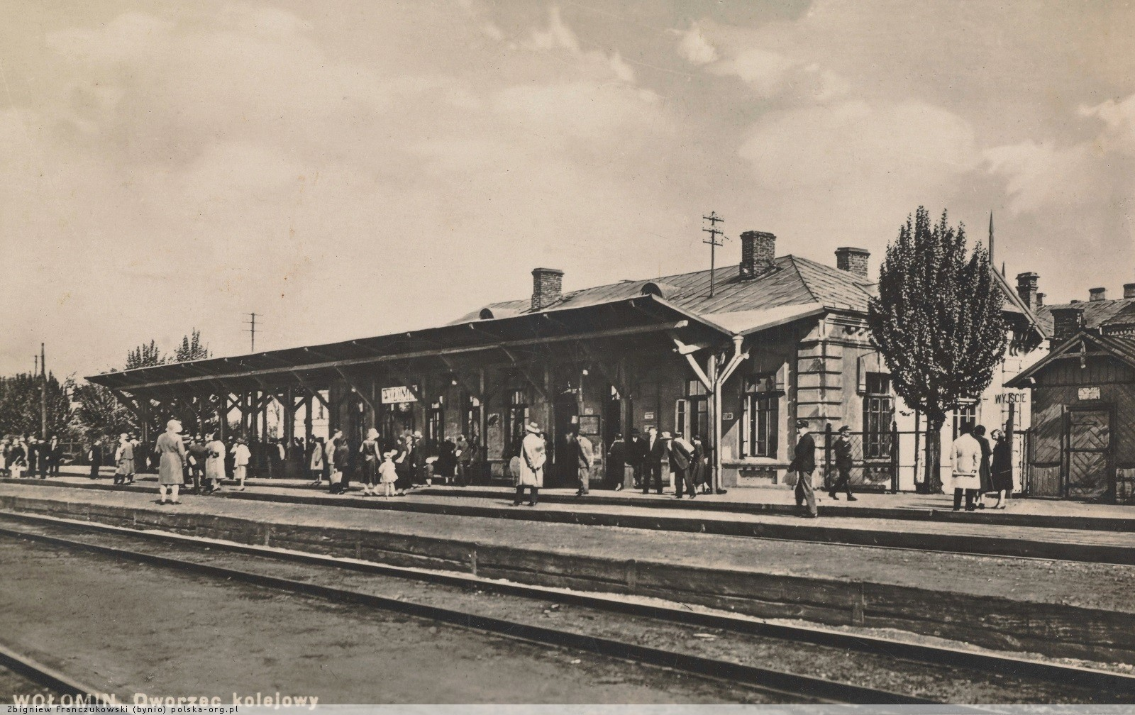 Stacja kolejowa Wolomin ul Kolejowa